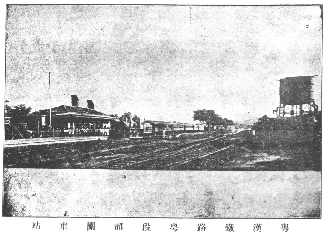 鐵路協會會刊-英國退還庚款築路問題（民國十五年六月）